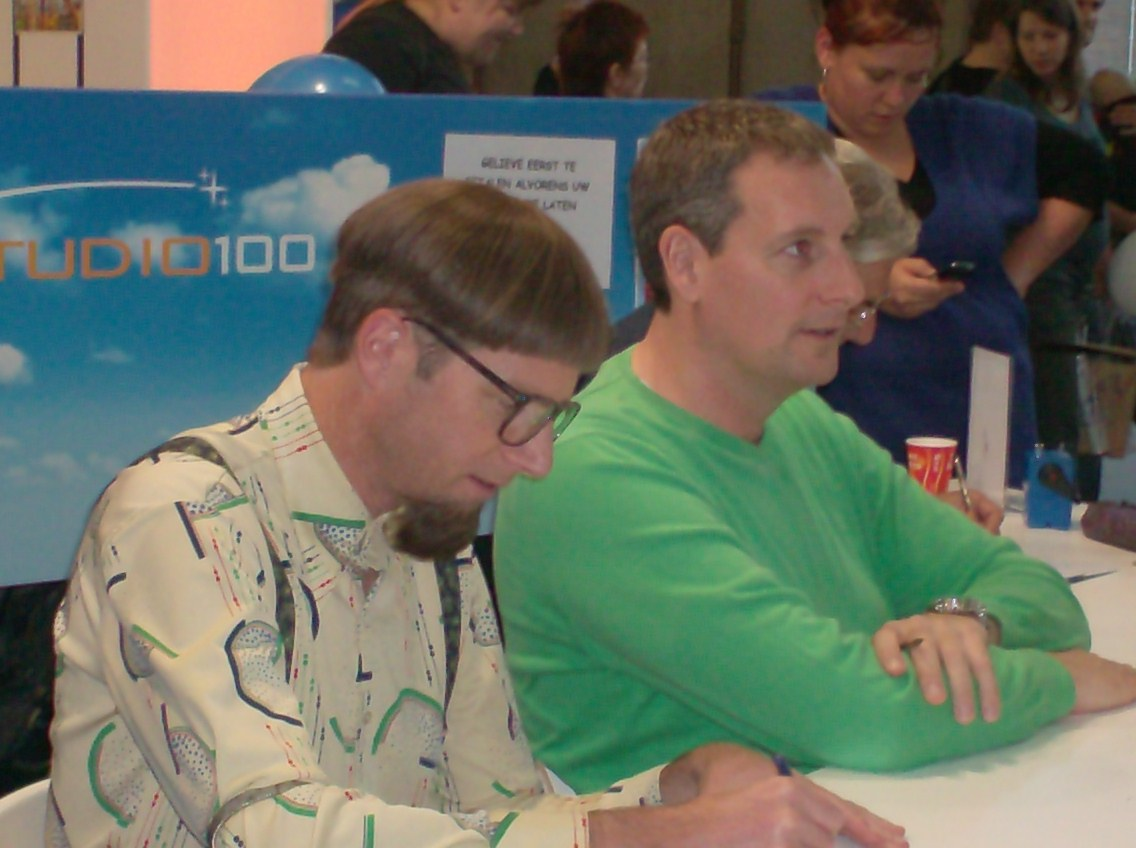 Walter Baele (als Eugène Van Leemhuyzen) en Gert Verhulst op de Boekenbeurs 2009 in Antwerpen